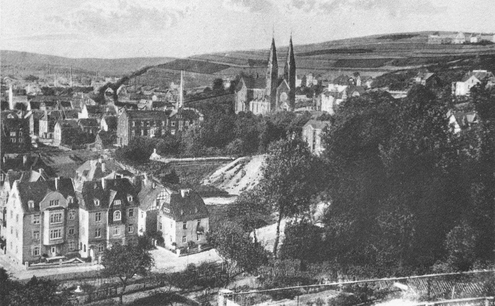 Römisch-katholische Kirche St. Michaelis am Giersberg in Siegen/Westfalen: Die Kirche auf einem Panoramafoto, aufgenommen nach der Weihung am 6. August 1906. Rechts oben im Bild der Südwesthang des damals noch weitgehend unbebauten Giersbergs.